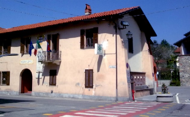 Municipio di Roppolo vista dal lato di Via Giacinto Massa